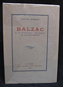 couverture de la première édition des chapitres sur la mort de Balzac, supprimés en 1907 lors de la publication de La 628-E8 d'Octave Mirbeau (1848-1917)